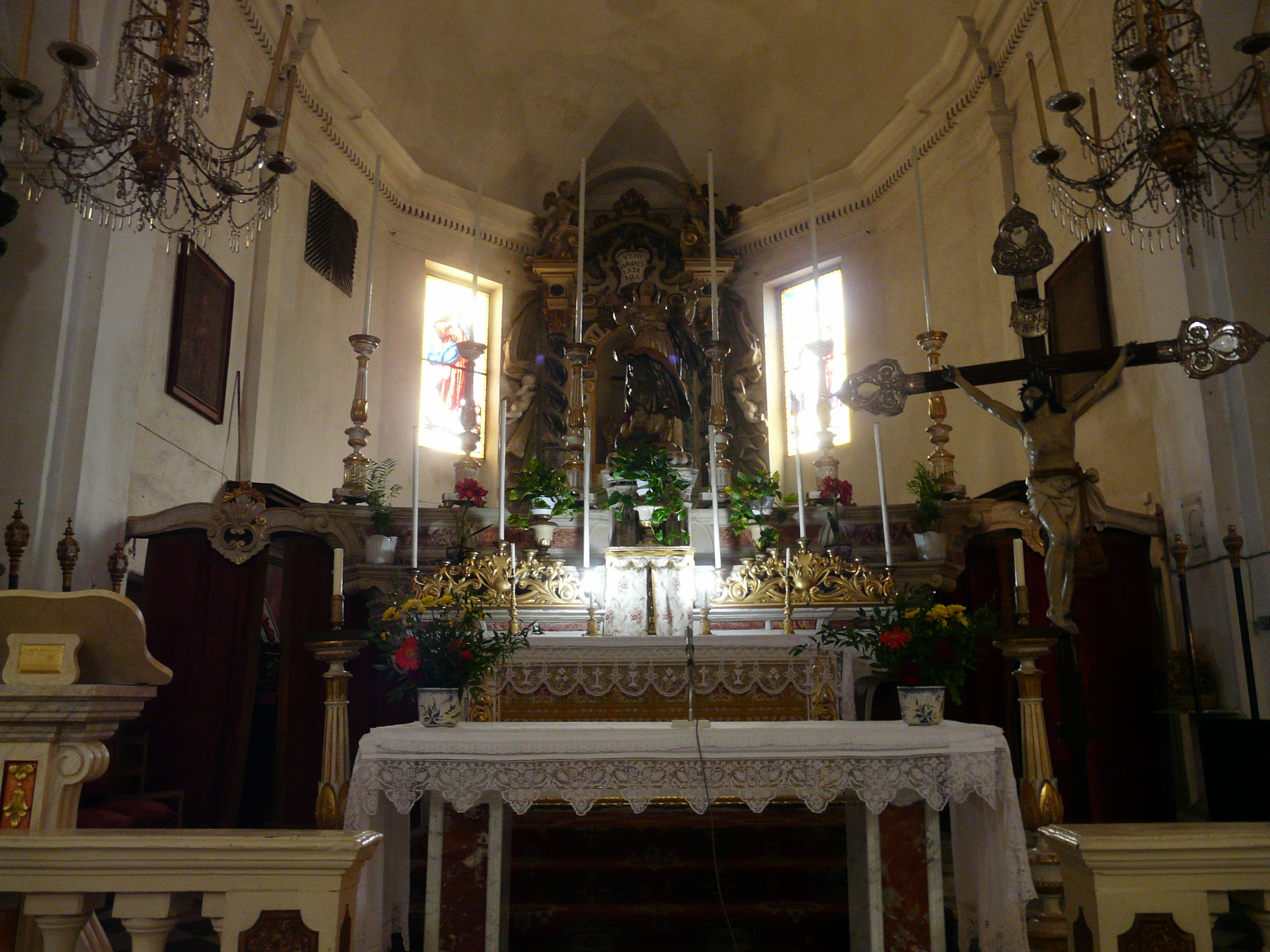 Serie di immagini interne della basilica della Concezione, Sassello, Liguria, Italia